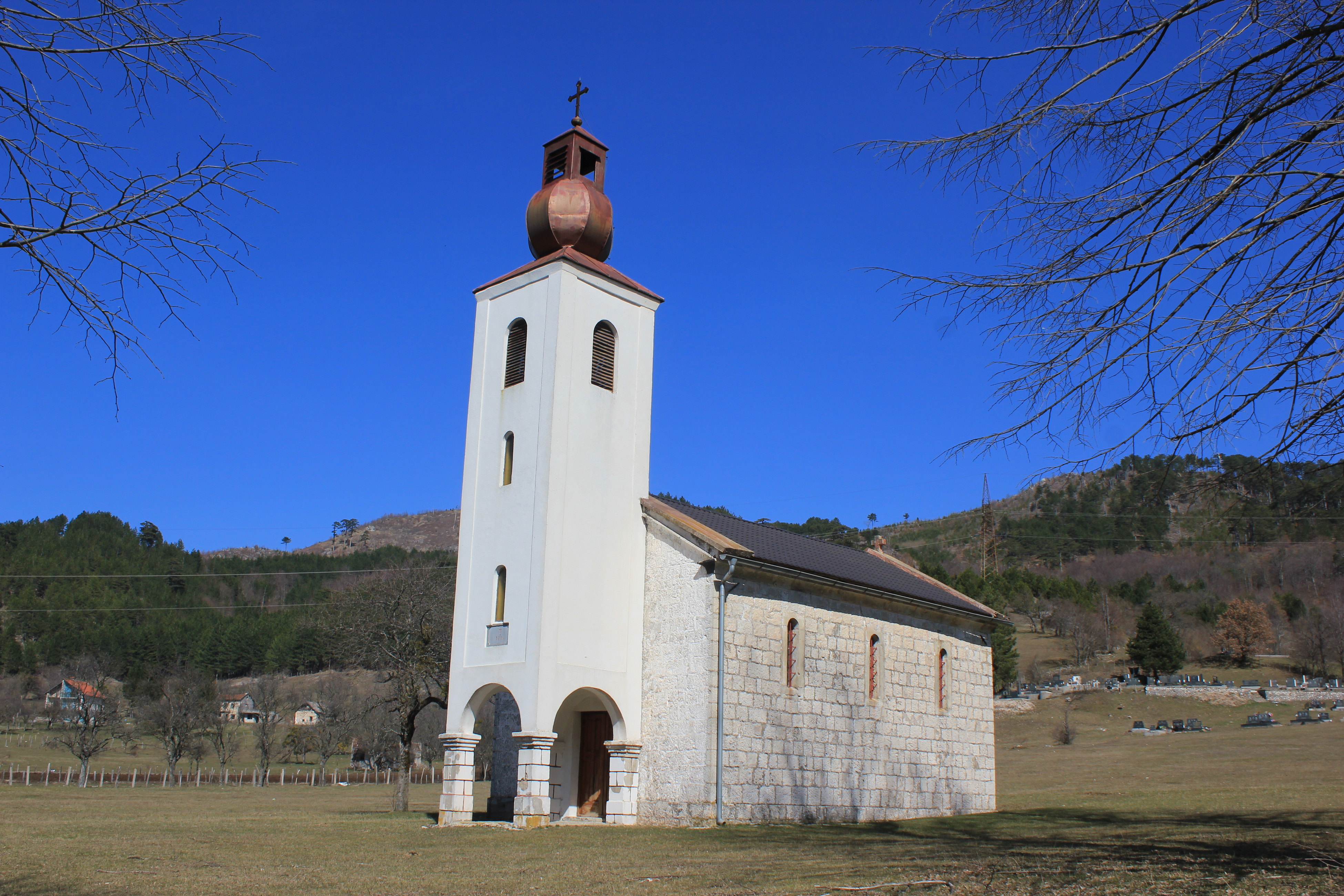 Im Dorf Borci (Gemeinde Konjic, Bosnien und Herzegowina).